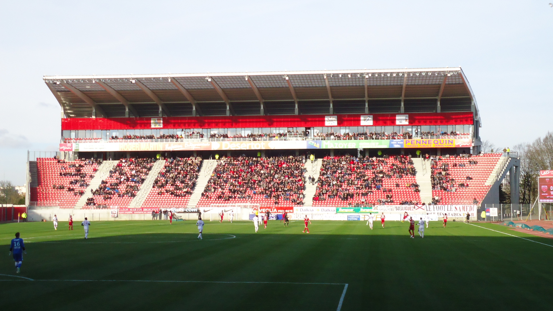 Match Dijon FCO - SM Caen (01/12/12)